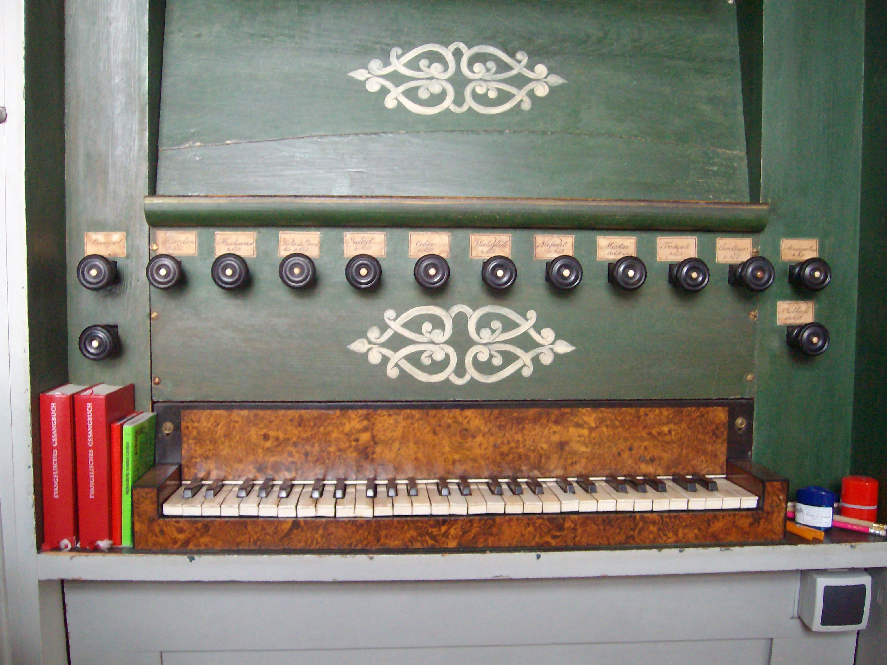 Spieltisch der Orgel der Kirche in Ober-Hörgern, Hessen, Deutschland